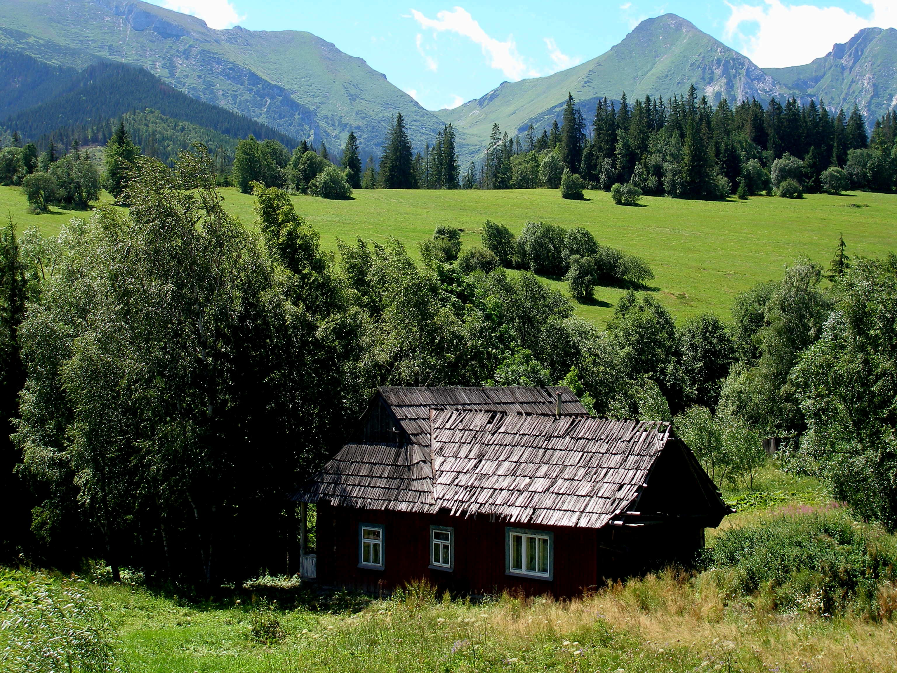 Intravilán rázovitej podtatranskej obce Ždiar.